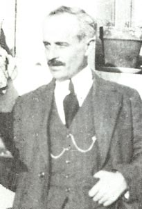 Just Songeon, poète et chansonnier savoyard de langue arpitane.